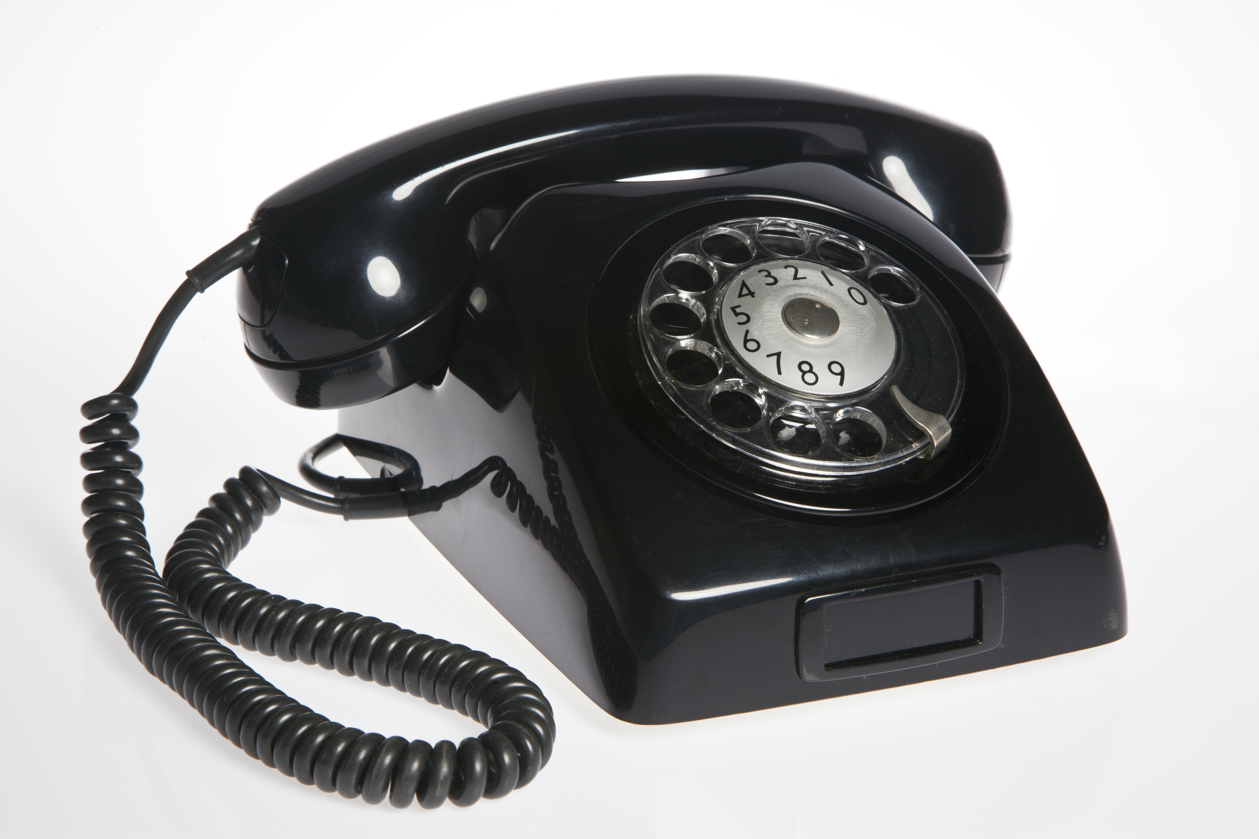 Telefonapparat Dialog från 1968 för AT-system, huvudapparat, anknytningsapparat till växel och sidoapparat. Bordsmodell av svart termoplast med transparent fingerskiva. Ringklockans signalstyrka inställbar med reglage på apparatens undersida. Apparatsnöre med proppanslutning. Dialog började tillverkas 1962 och blev Televerkets standardtelefon i mars 1969. Formgivarna från arkitektkontoret Ahlgren-Olsson-Silow (AOS) var starkt influerade av amerikanen Henry Dreyfuss ergonomistudier. I takt med att plasten gjorde sitt intåg i tillverkningsindustrin på 1950-talet kunde man ersätta telefonernas tunga och sköra bakelitskal med ett formsprutat plastskal. De främsta fördelarna var att man reducerade telefonens vikt och att den blev billigare att tillverka. Den svenska telefonen Dialog introducerades 1962 och var resultatet av ett projekt som framhöll att formgivning, ergonomi, teknik och tillverkningsmetod skulle ha lika prioritet. Den nya telefonen innehöll flera nyheter bland vilka kan nämnas ergonomiskt utformad lur, kåpa med inbyggt bärgrepp, reglerbar ringklocka, automatisk reglering av transmissionsnivån i förhållande till abonnentledningens längd och att den var möjlig att få i flera färger. Den tillverkades både av L.M Ericsson och Televerkets verkstad, i regel med fingerskiva men även i flera varianter med knappsats. Dialog presenterades för den svenska allmänheten i maj 1965. Föremålet tillhör den samling från Telemuseum som skänktes av TeliaSonera AB till Tekniska Museet 2010.